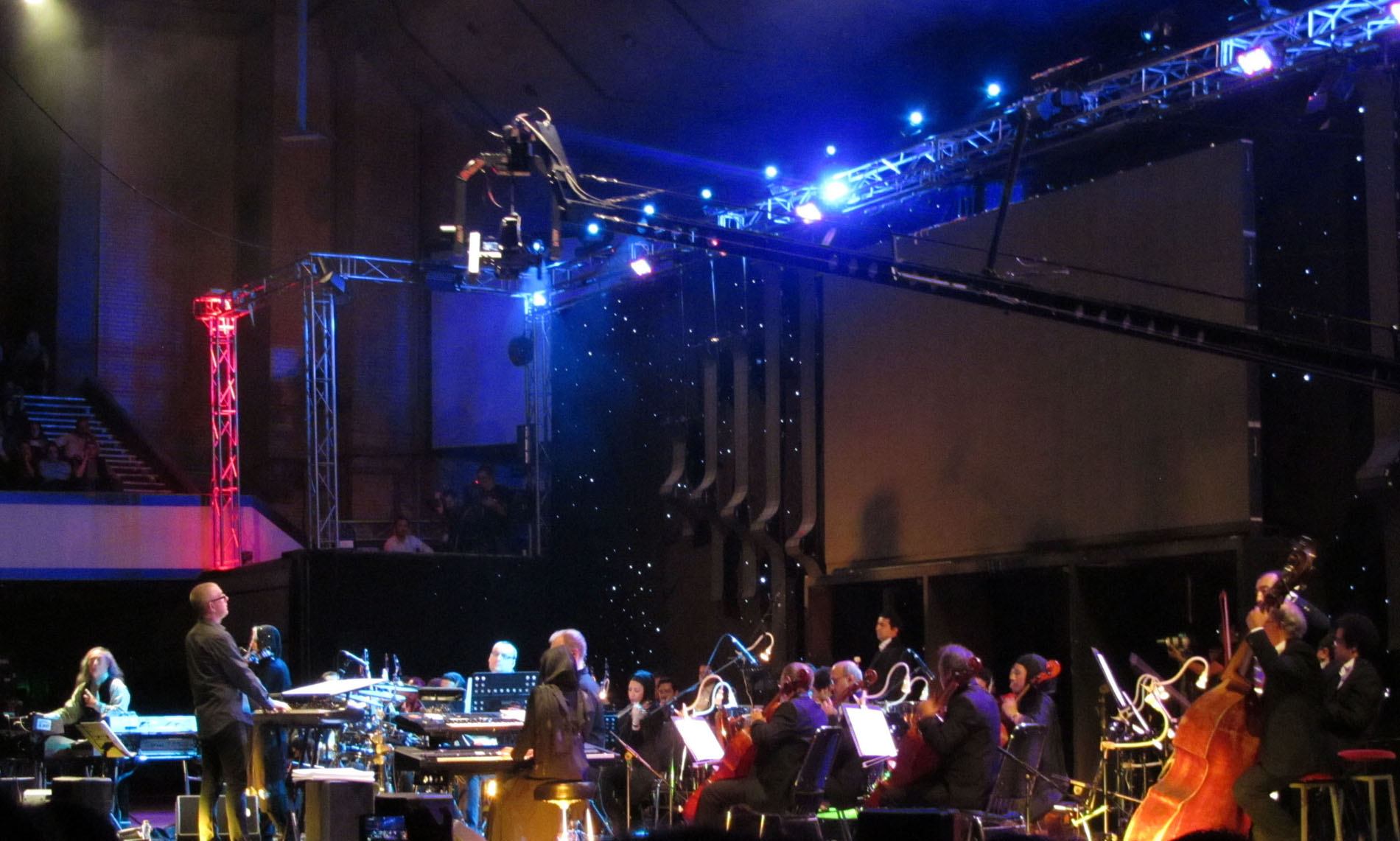 Kitaro concert at Tehran Oct 2014